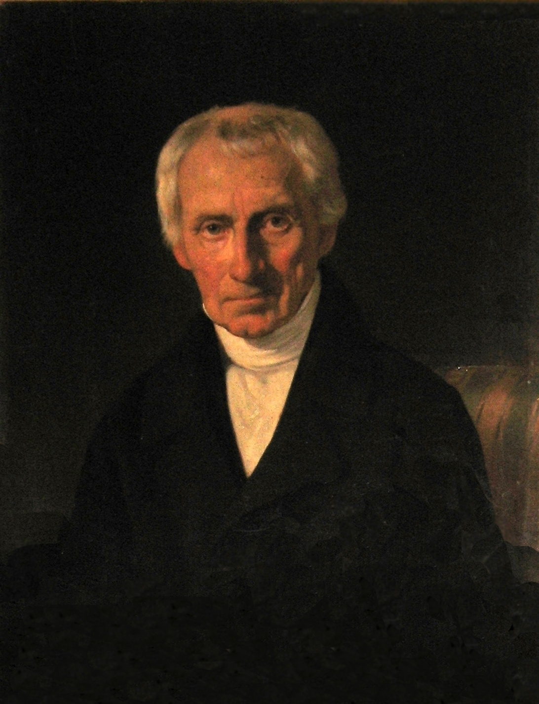 історик, архівіст, етнограф Денис Іванович Зубрицький (1777—1862): портрет